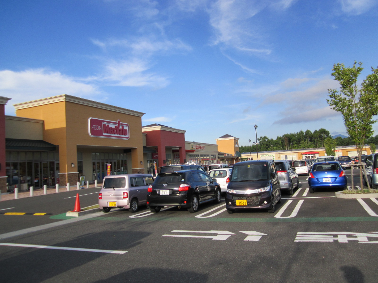 Fujikawaguchiko Town,Yamanashi Pref